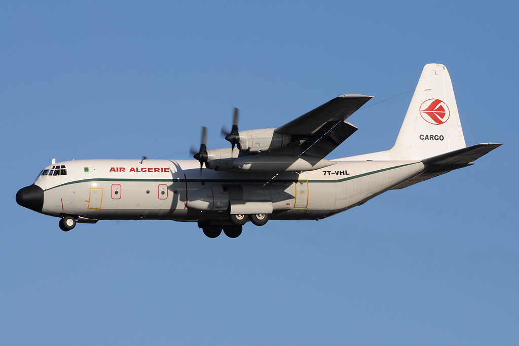 7T-VHL (cn 382-4886) A very welcome return by an Air Algerie Hercules for the second Sunday running on flight AH2718 after an absence of about 20 years. During the 1980s they were regular visitors